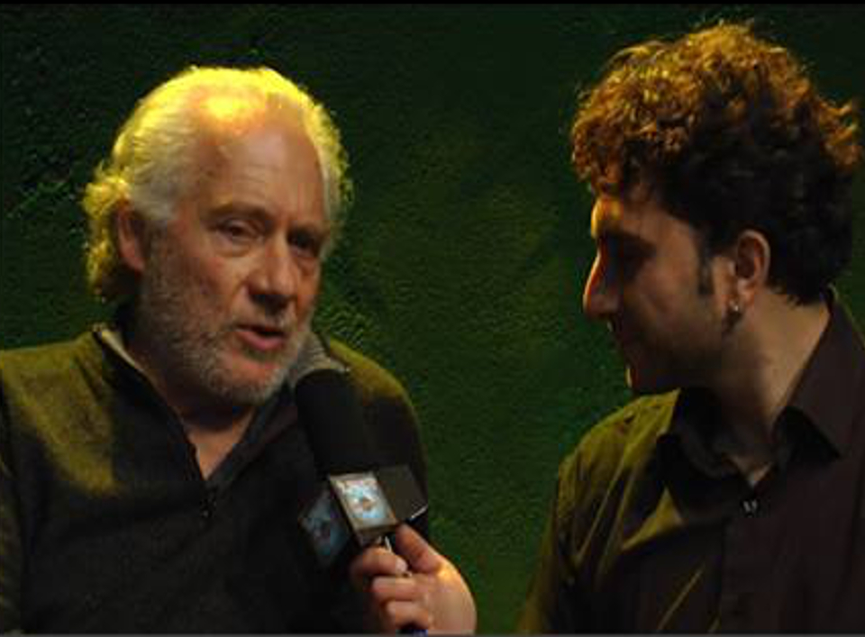 Giorgio Colangeli in un intervista del 2014